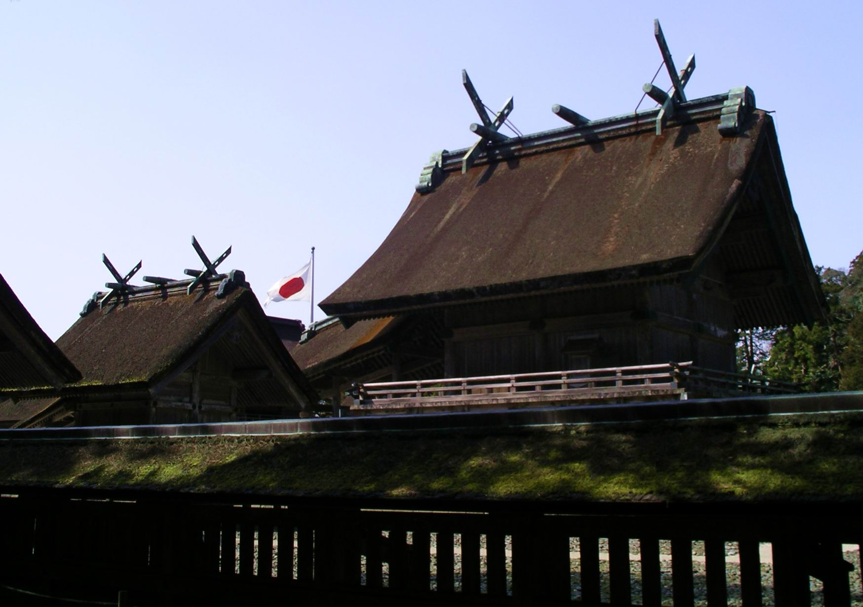 Izumo Taisha, Shimane.